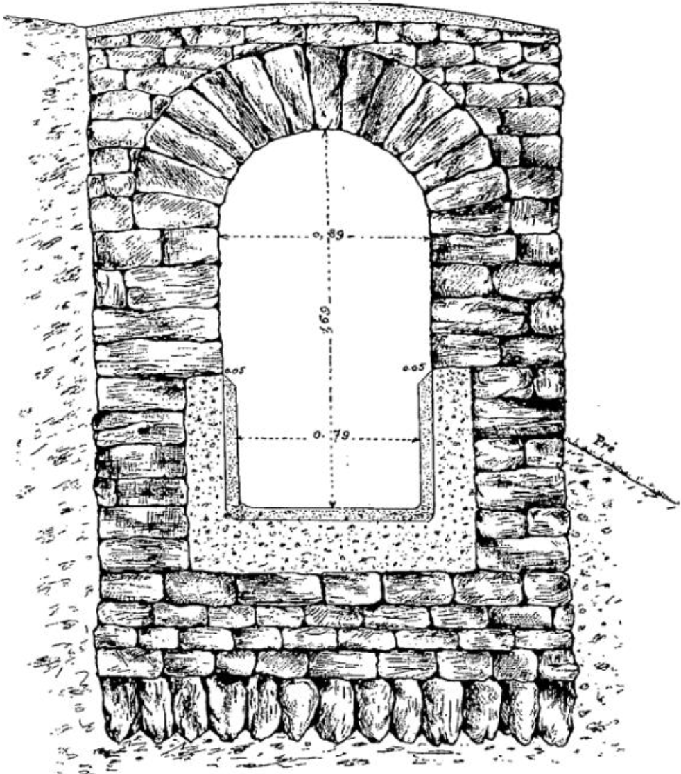 Coupe de l'aqueduc romain de la Brévenne aux Thus (commune de Chevinay)